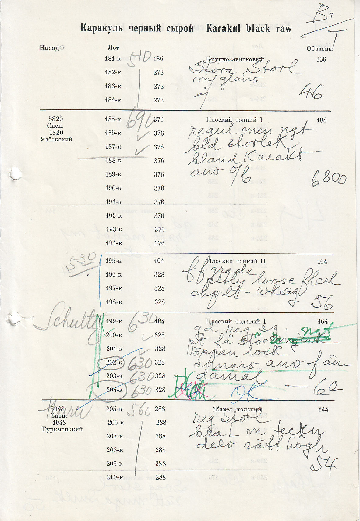 Pelz-Auktionskatalog mit Bewertungen von Jury Fränkel, Sojuzpushnina, November 1970.